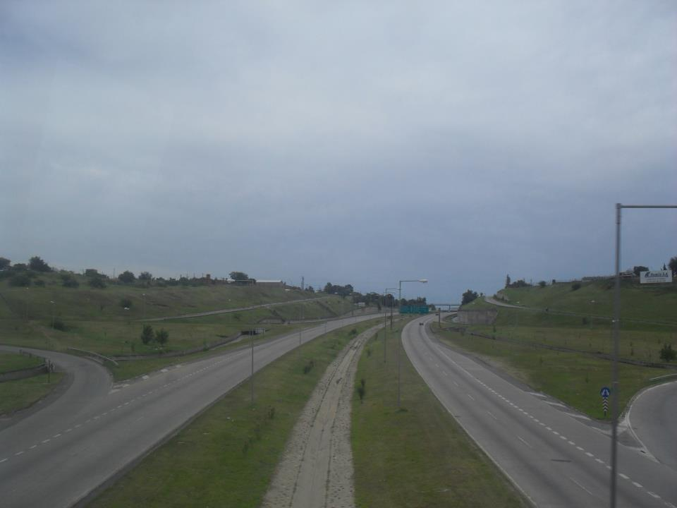 Vista de la avenida de Circunvalación (Ruta Nacional A019) de la ciudad de Córdoba. Argentina.